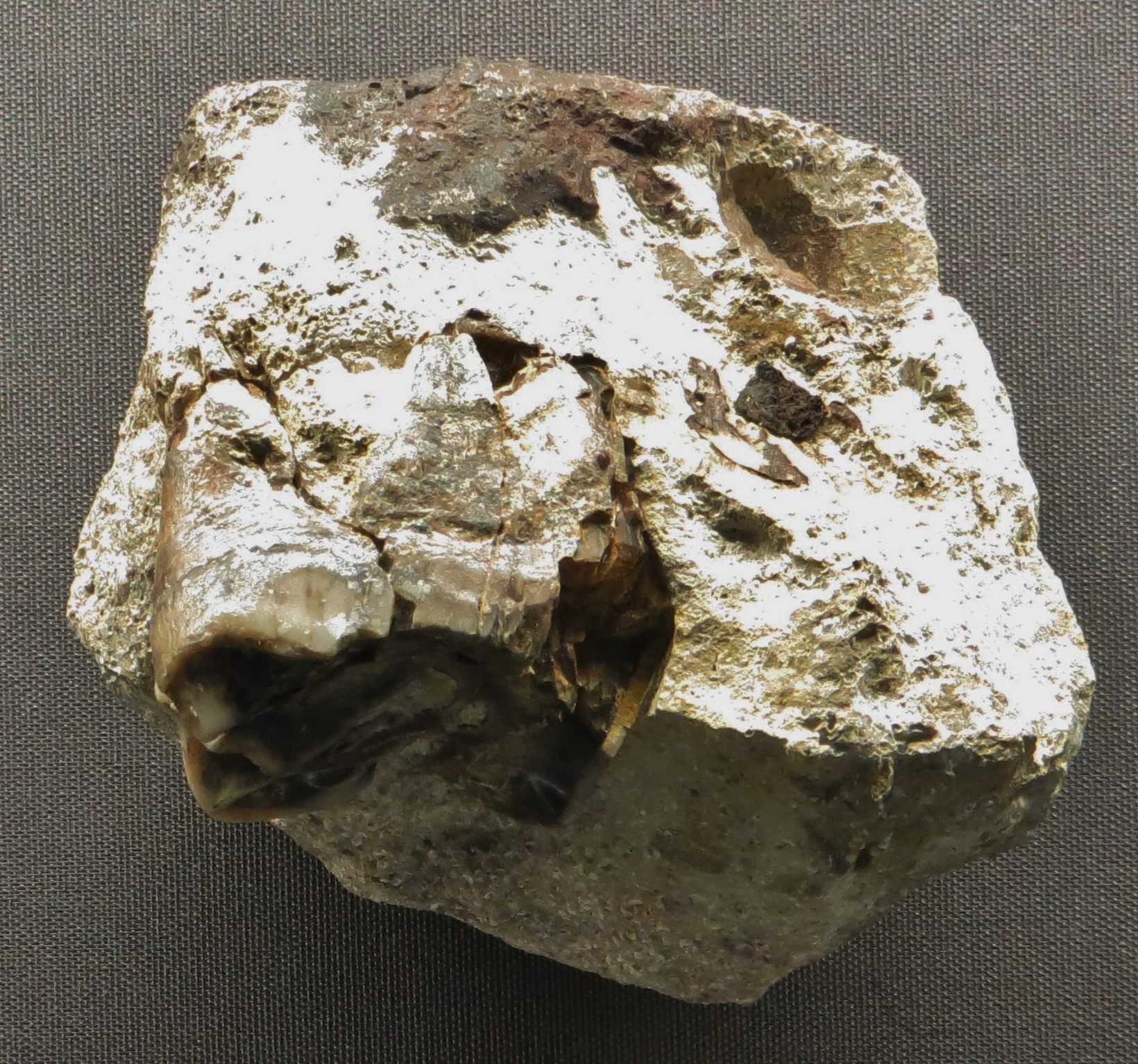 Fossil of Diaceratherium lemanense (syn. Aceratherium lemanense) - Took the picture at Natural History Museum, Wiesbaden